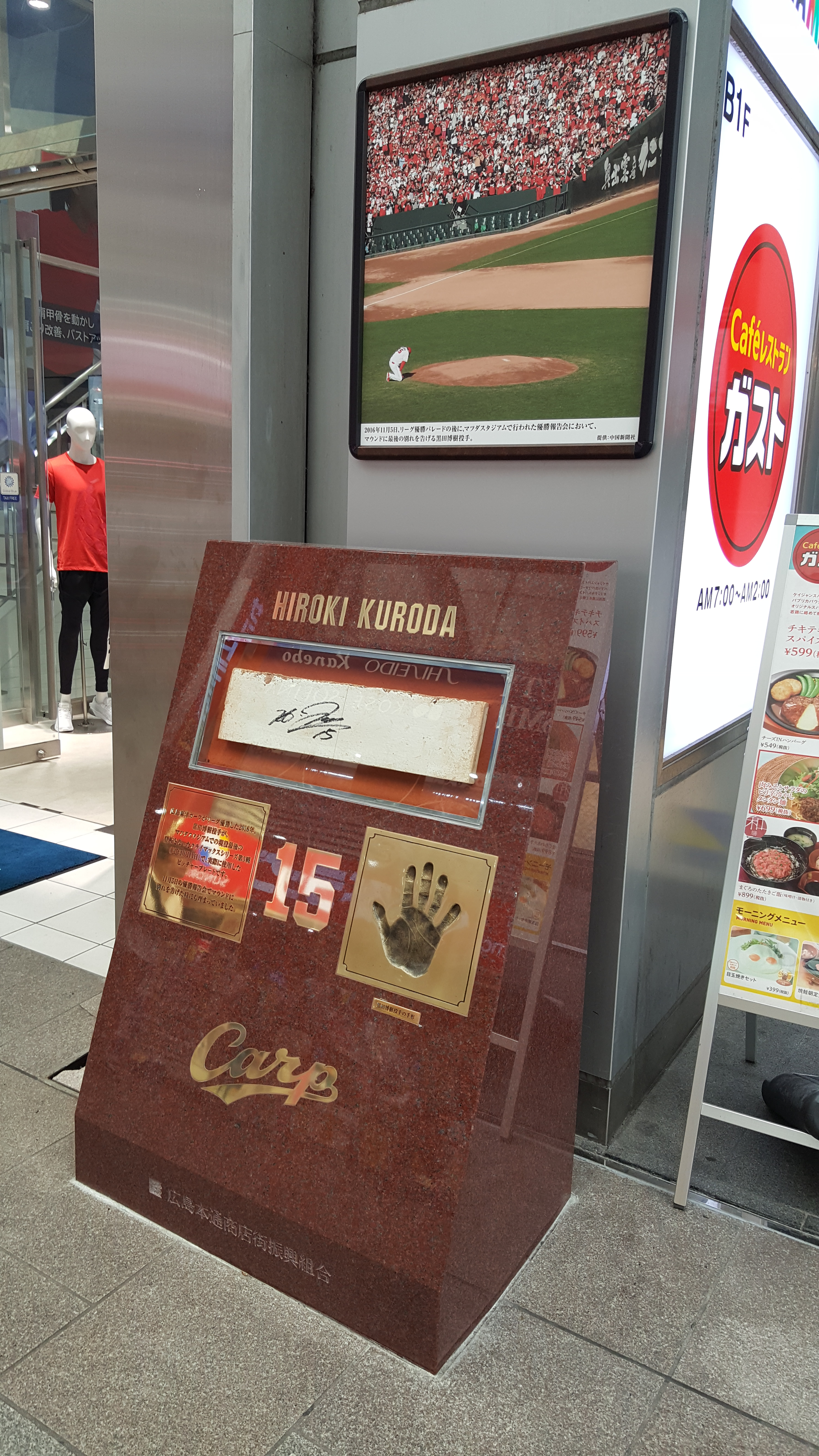 広島本通商店街（本通ヒルズ前）に設置された、黒田博樹の石碑。最終登板時・引退報告会時にマツダスタジアムにて使われたピッチャープレートと手型